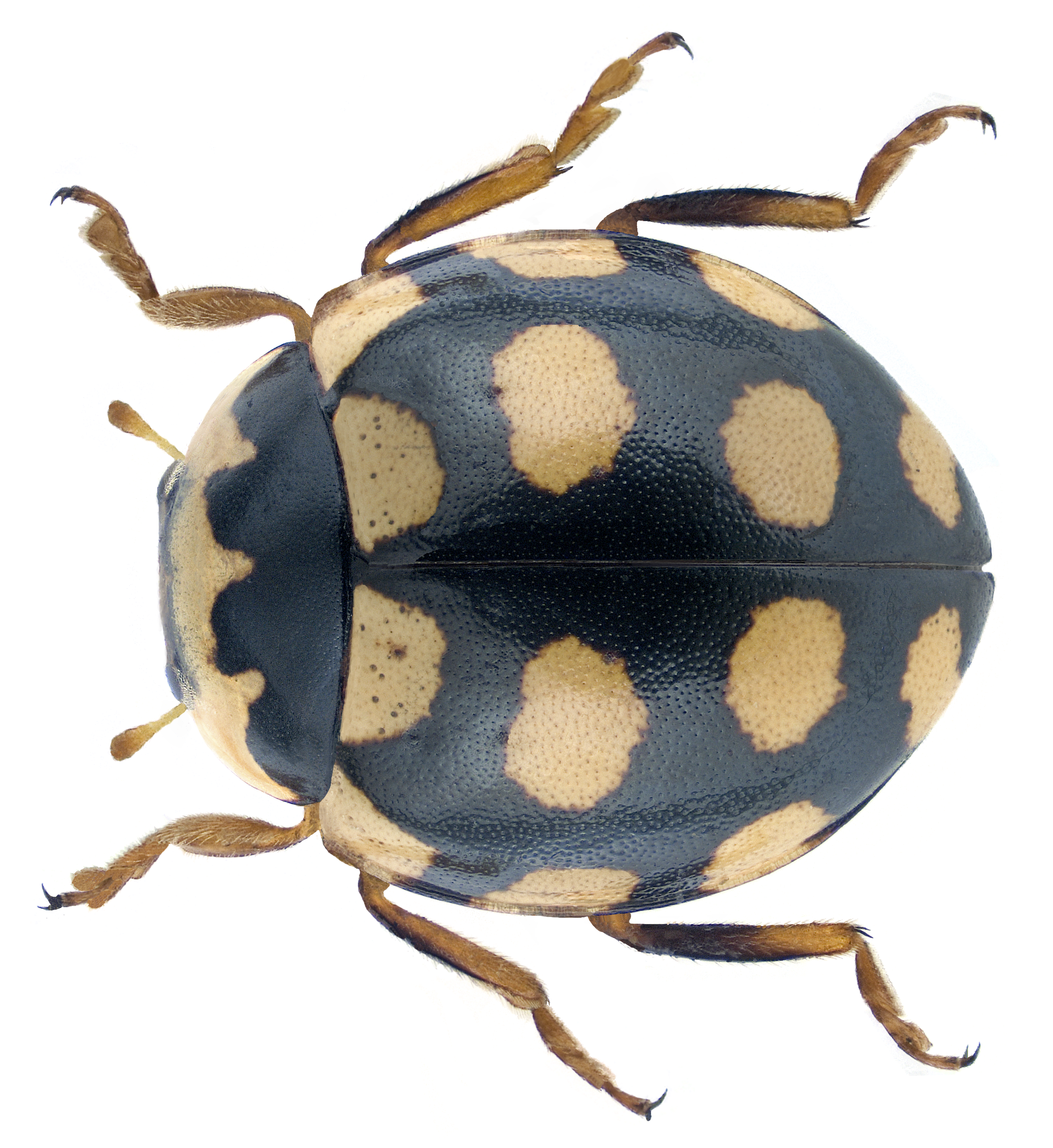 Coccinula quatuordecimpustulata (Linnaeus, 1758) Familie: Coccinellidae Groesse: 3,5 mm (3,0 bis 4,0 mm) Fundort: France, Dep. Lot et Garonne, Duras leg.det. P.M.Hammond, 26.VIII.1986 Coll.Nat.Hist.Museum, London Foto: U.Schmidt, 2019